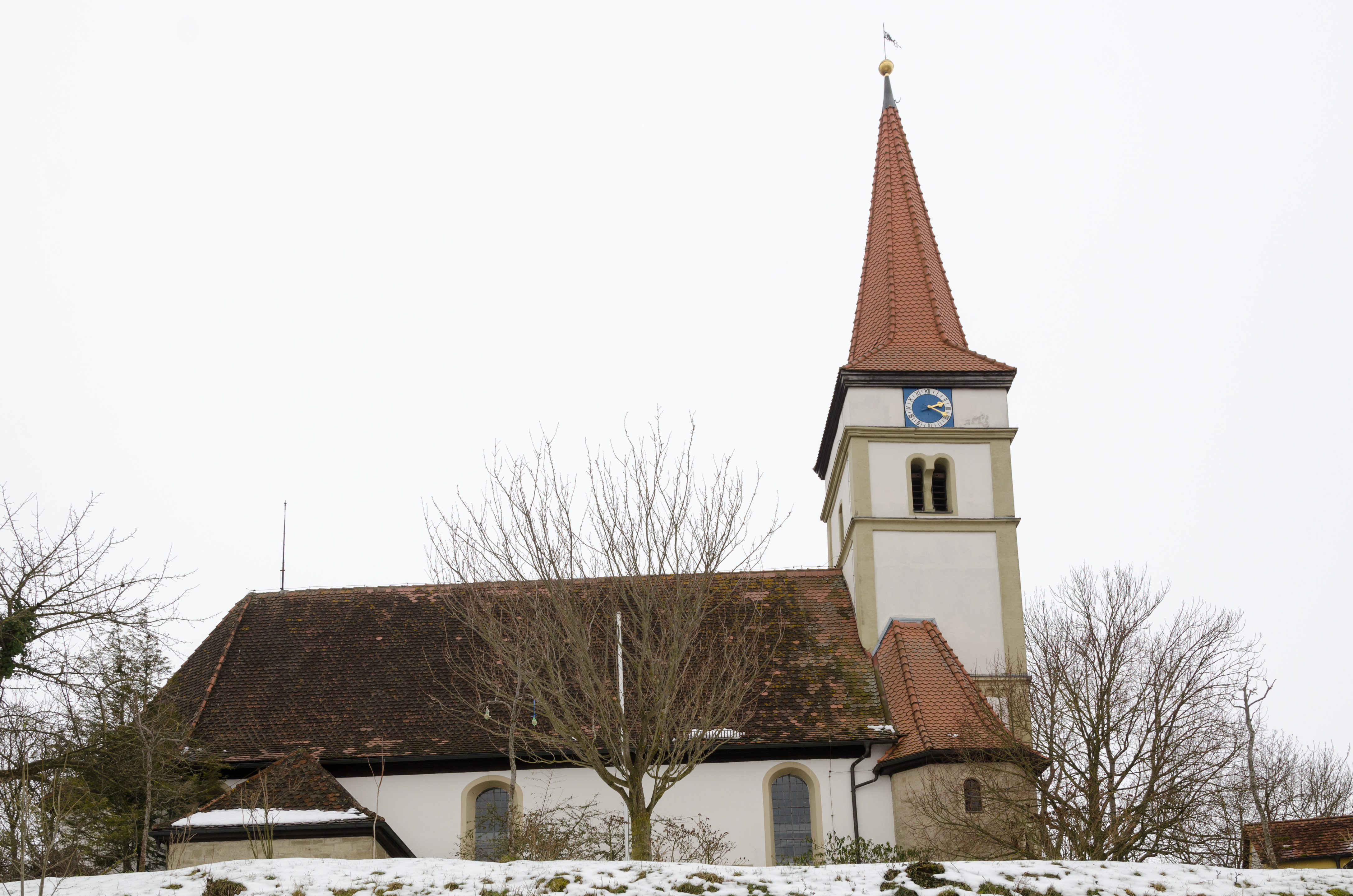 Ippesheim, Evangelische Kirche